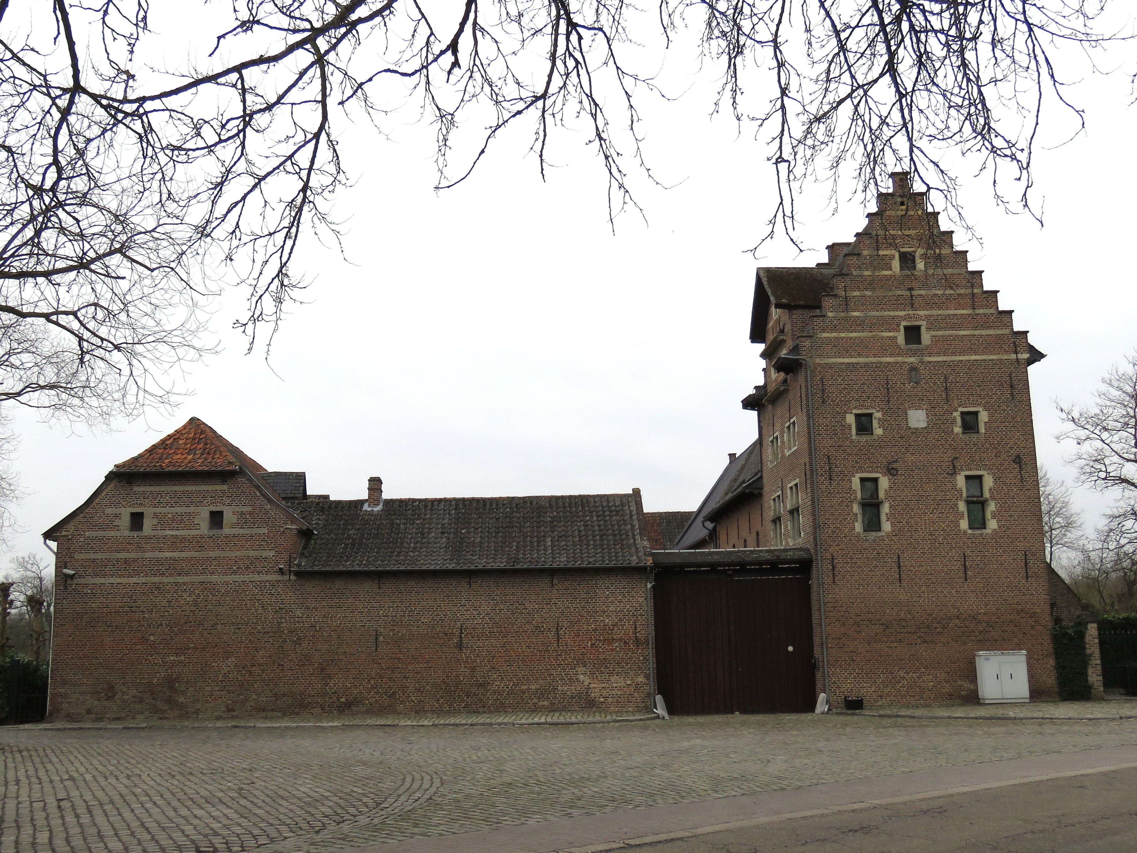 Schaliewinning 1659 in Gorsem (Sint-Truiden)